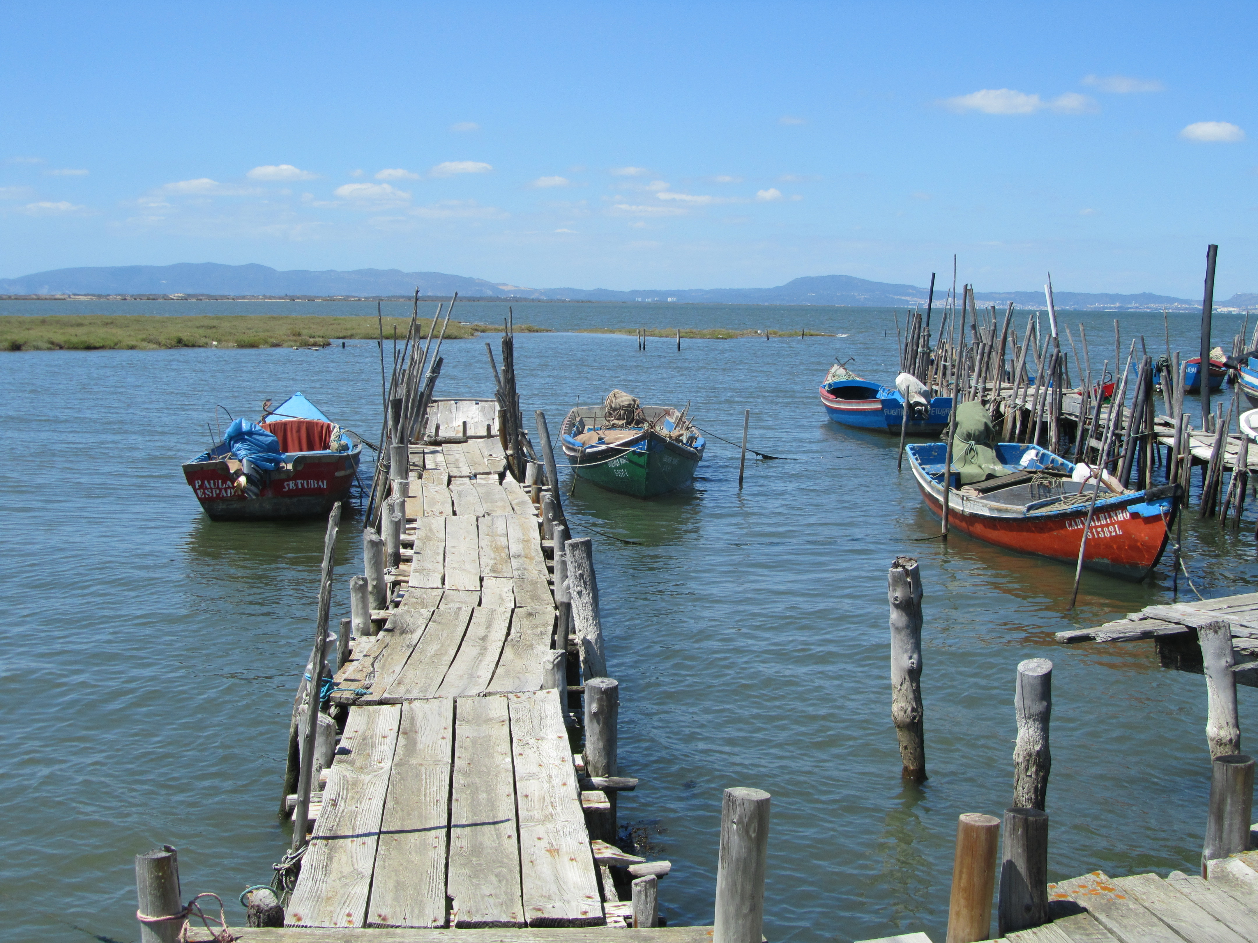 Cais palafítico. Carrasqueira. Comporta. Alcácer do Sal. Portugal